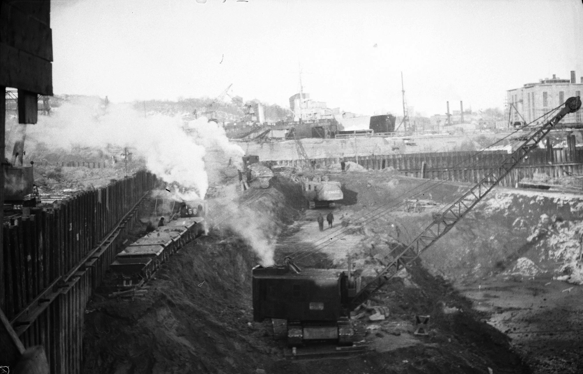 Format: Fotonegativ Dato / Date: 11.03.1942 Fotograf / Photographer: Fritz Petter Digre (1897 - 1992) Sted / Place: Nyhavna, Trondheim Wikipedia: Dora Wikipedia: Organisation Todt Eier / Owner Institution: Trondheim byarkiv, The Municipal Archives of Trondheim Arkivreferanse / Archive reference: Tor.H43.B81.F29616 - Konv 78 Merknad: Fra byggingen av ubåtanlegget Dora på Nyhavna 11 mars 1942. Fotografen Fritz Petter Digre (1897 – 1992) var født på Nedre Bakklandet og bodde i Mellomveien 11 fra 1900. Han var utdannet sersjant ved underoffiserskolen på Oscarsborg og var fra 1919 ulønnet sersjant ved Agdenes festning. I 1920 – 1926 jobbet han ved Nidar Sjokoladefabrikk. I 1939 ble han innkalt til nøytralitetsvakt og deltok 9. april på Brettingen fort. I 1941 sendte Arbeidskontoret ham på anleggsarbeid. Etter krigen var han en tid i Kystartilleriet, Brigade Trøndelag, og søkte avskjed i 1948 som sersjant. Hans hobbyer var amatørfotografering og slektsgransking.